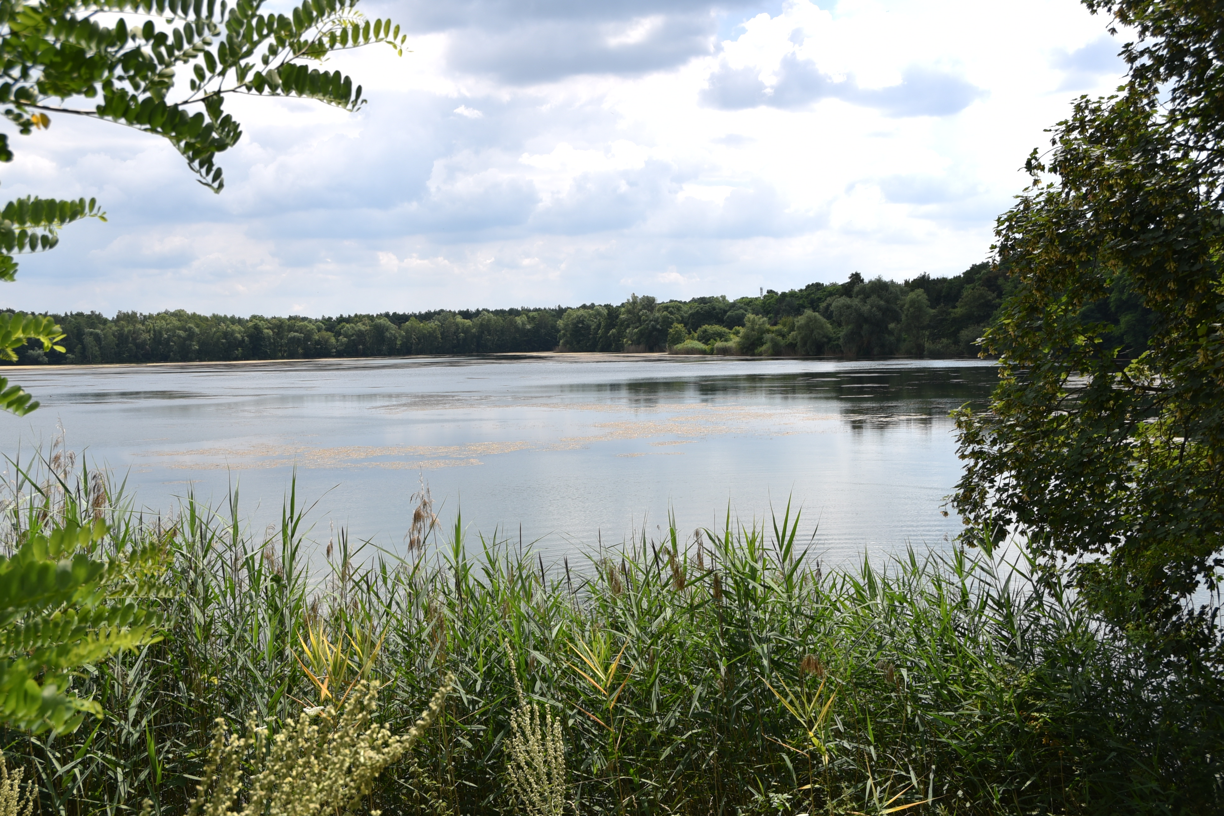 NSG Bongsche Kiesgrube und Mainufer bei Mainflingen